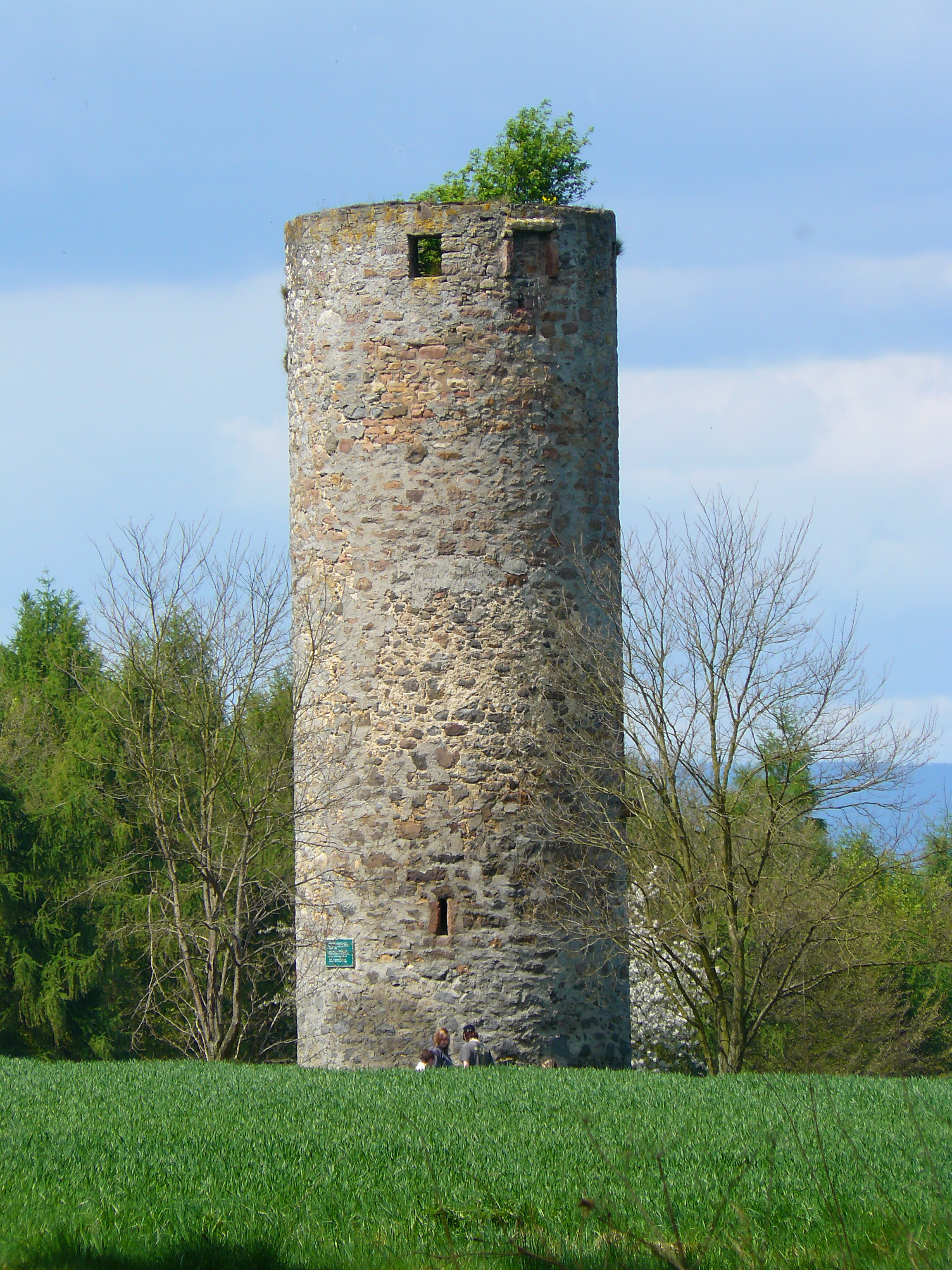 Der Spießturm